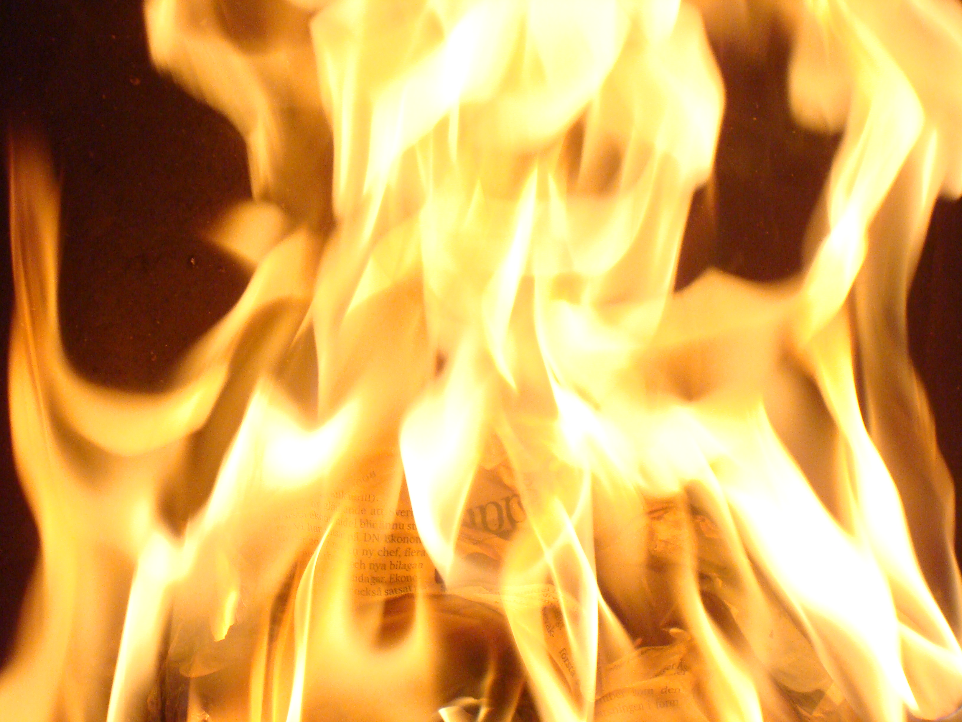 En eld i en öppen spis i Sverige